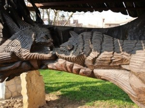 Talla del artista Joxe Ulibarrena para el pueblo de Garinoain